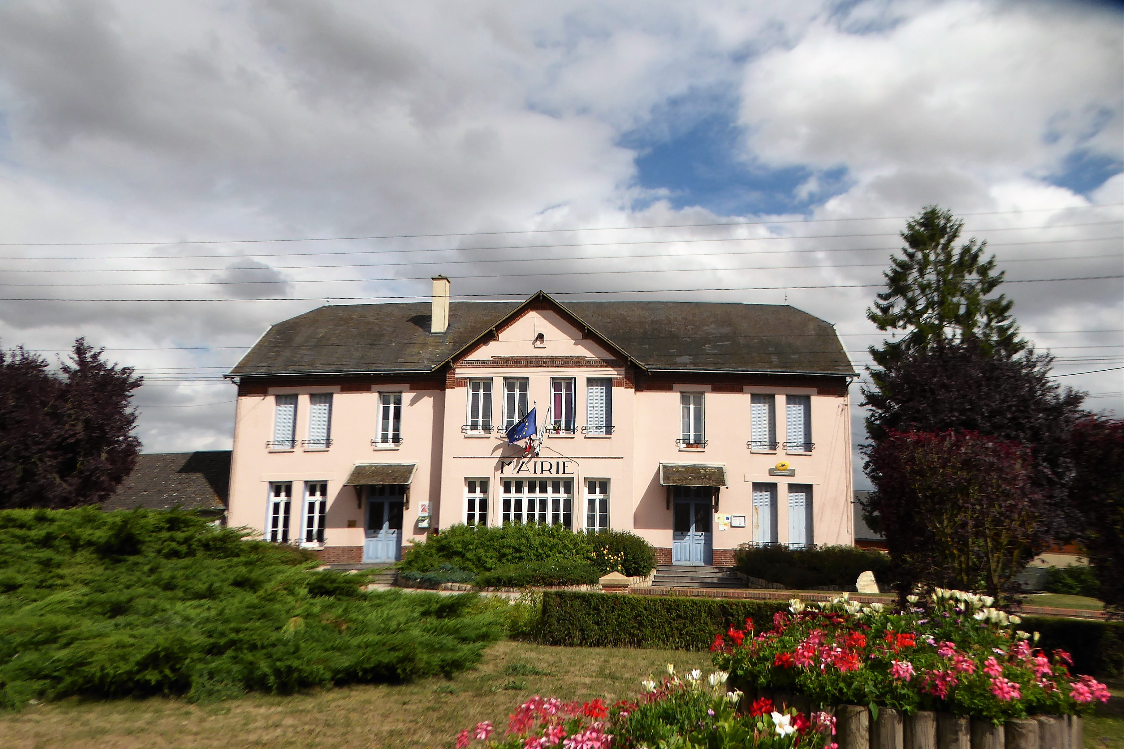 mairie, Clévilliers, Eure-et-Loir (France).